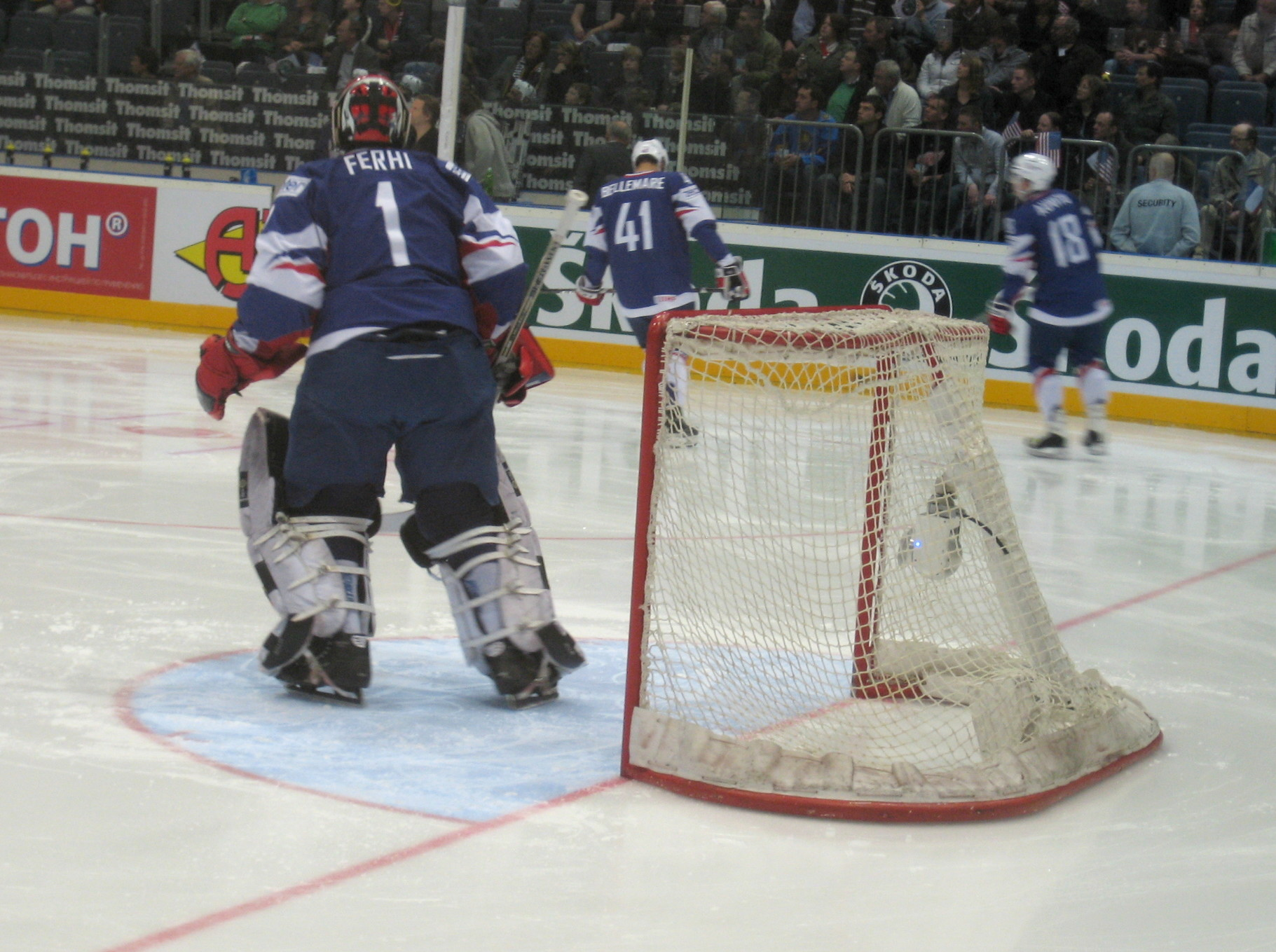 Spieler der französischen Nationalmannschaft von links nach recht: 1 FRA Eddy Ferhi, 18 FRA Yohann Auvitu, 41 FRA Pierre-Edouard Bellemare Spiel 33, Abstiegsrunde, Eishockey-Weltmeisterschaft der Herren 2010 in der Kölnarena